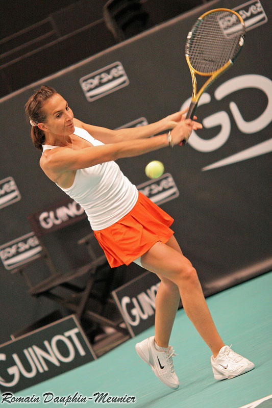 Selima Sfar (TUN), Qualifications 1er tour, Open Gaz de France Suez, Stade Pierre de Coubertin, Paris, samedi 7 février 2009.